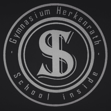 Logo der Schülerzeitung "School Inside"